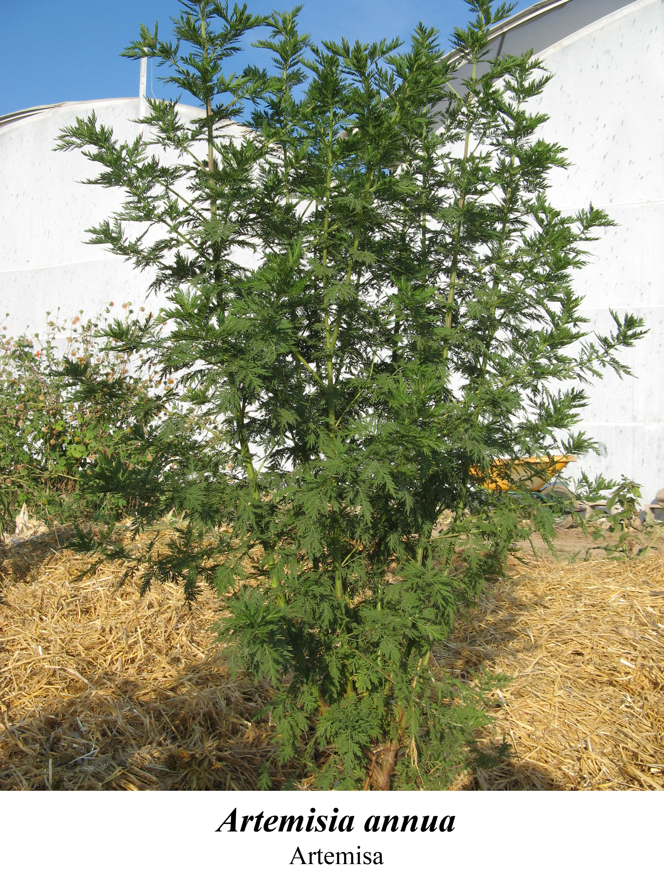 planta medicinal